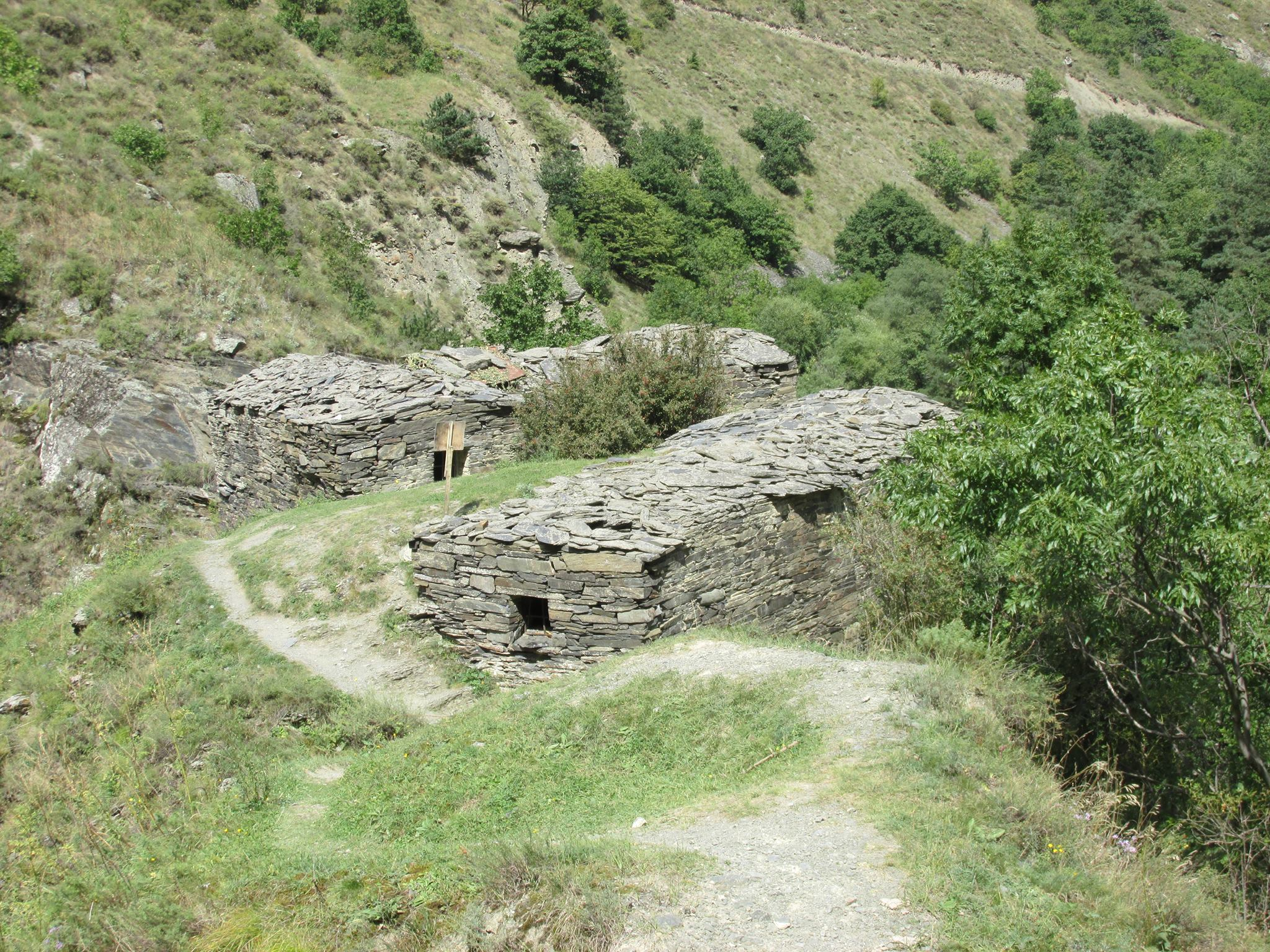 ანატორის აკლდამები